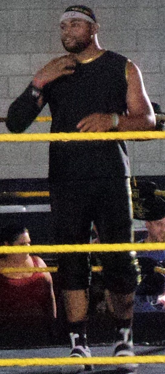 P_20170505_193441_002